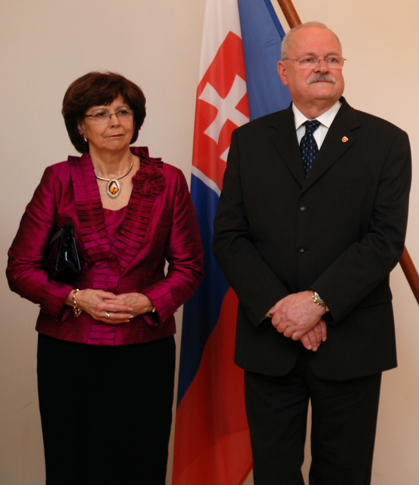 Ivan Gašparovič a Silvia Gašparovičová